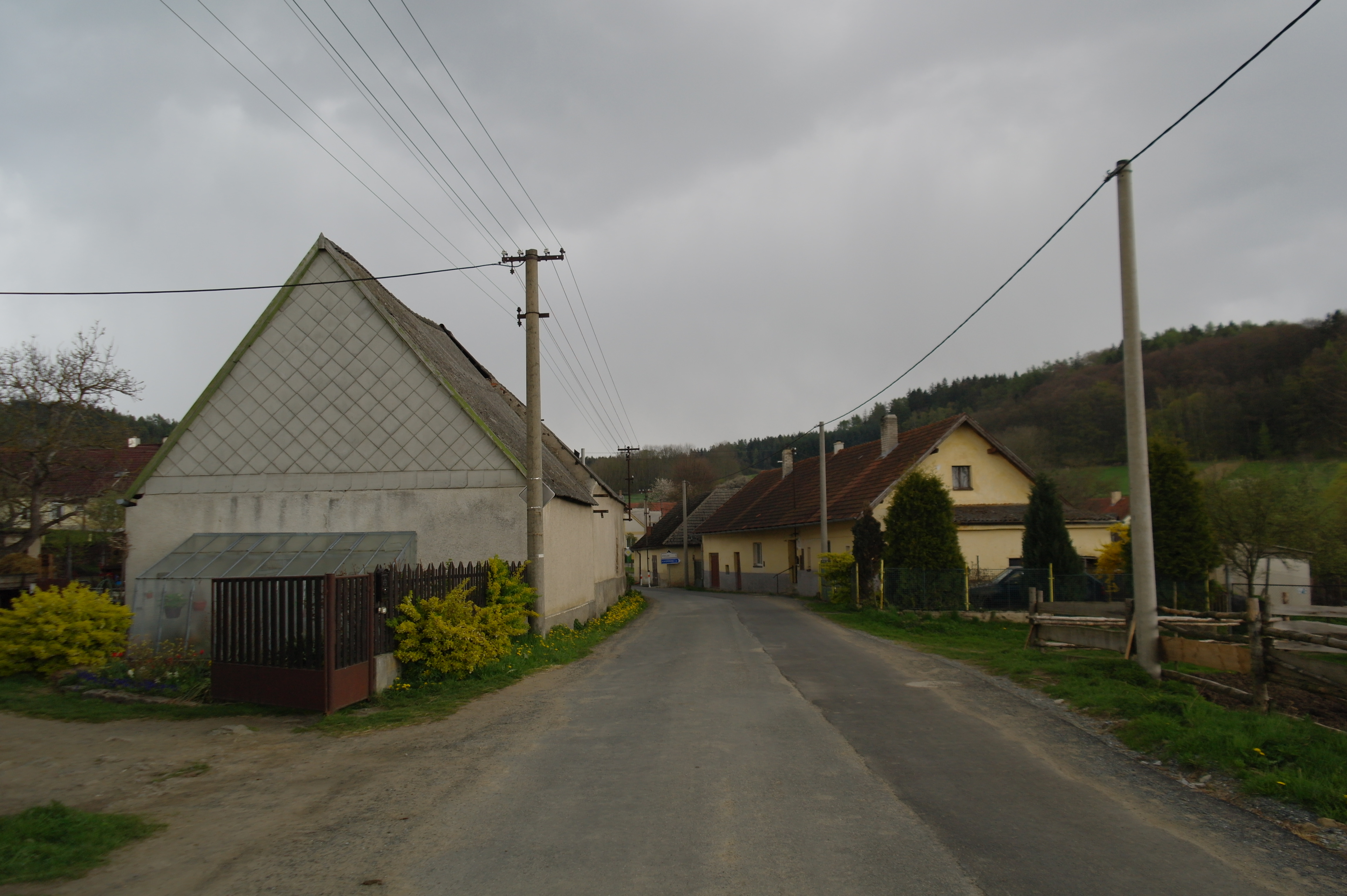 Chlumy, ulice směr Nekvasovy